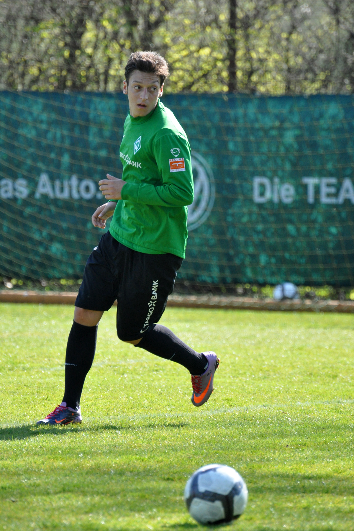 Mesut Özil with Werder Bremen in April 2010.